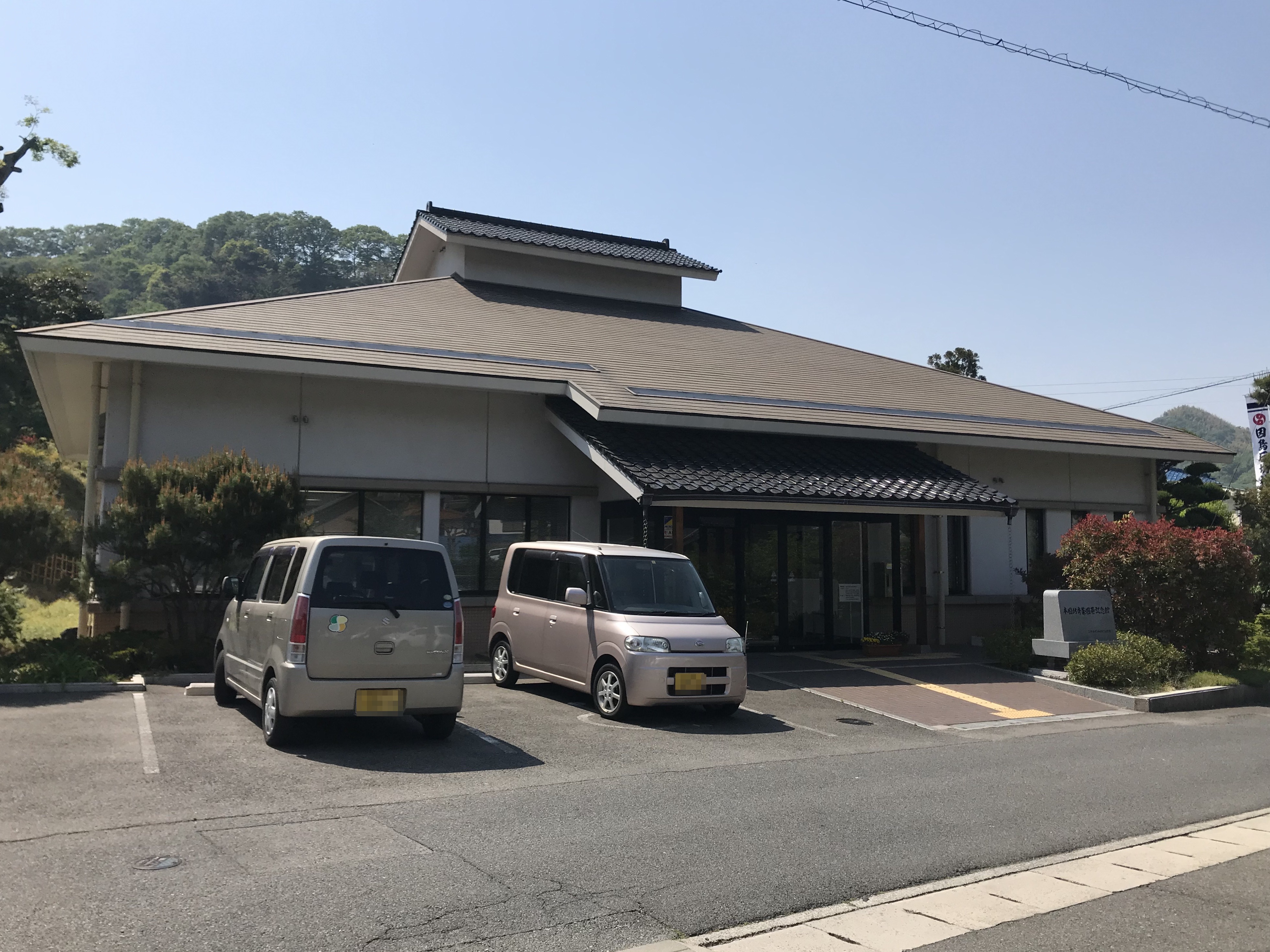 本因坊秀策囲碁記念館